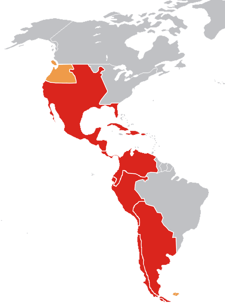 Mapa de la América española a finales del siglo XVIII / Map of Spanish America (XVIII century)